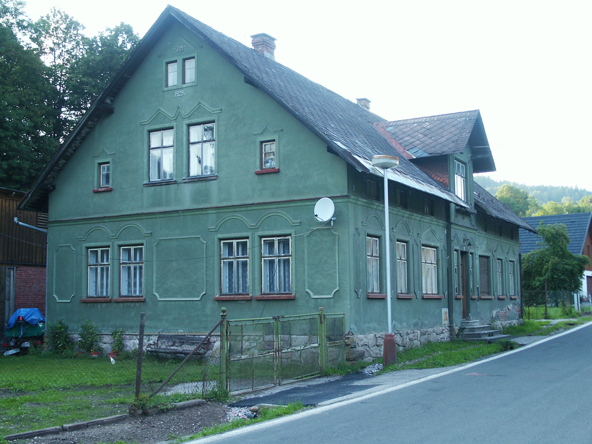 Horní Lánov - č.p. 118